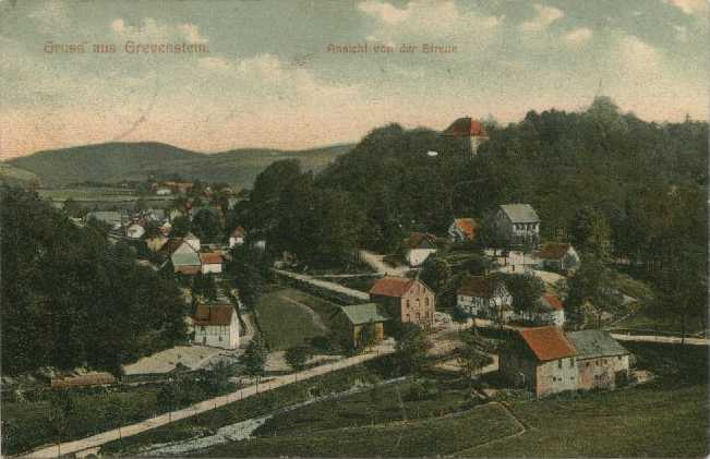 Grevenstein um 1900, Ansicht von der Streue mit Brechtmanns Wassermühle im Vordergrund